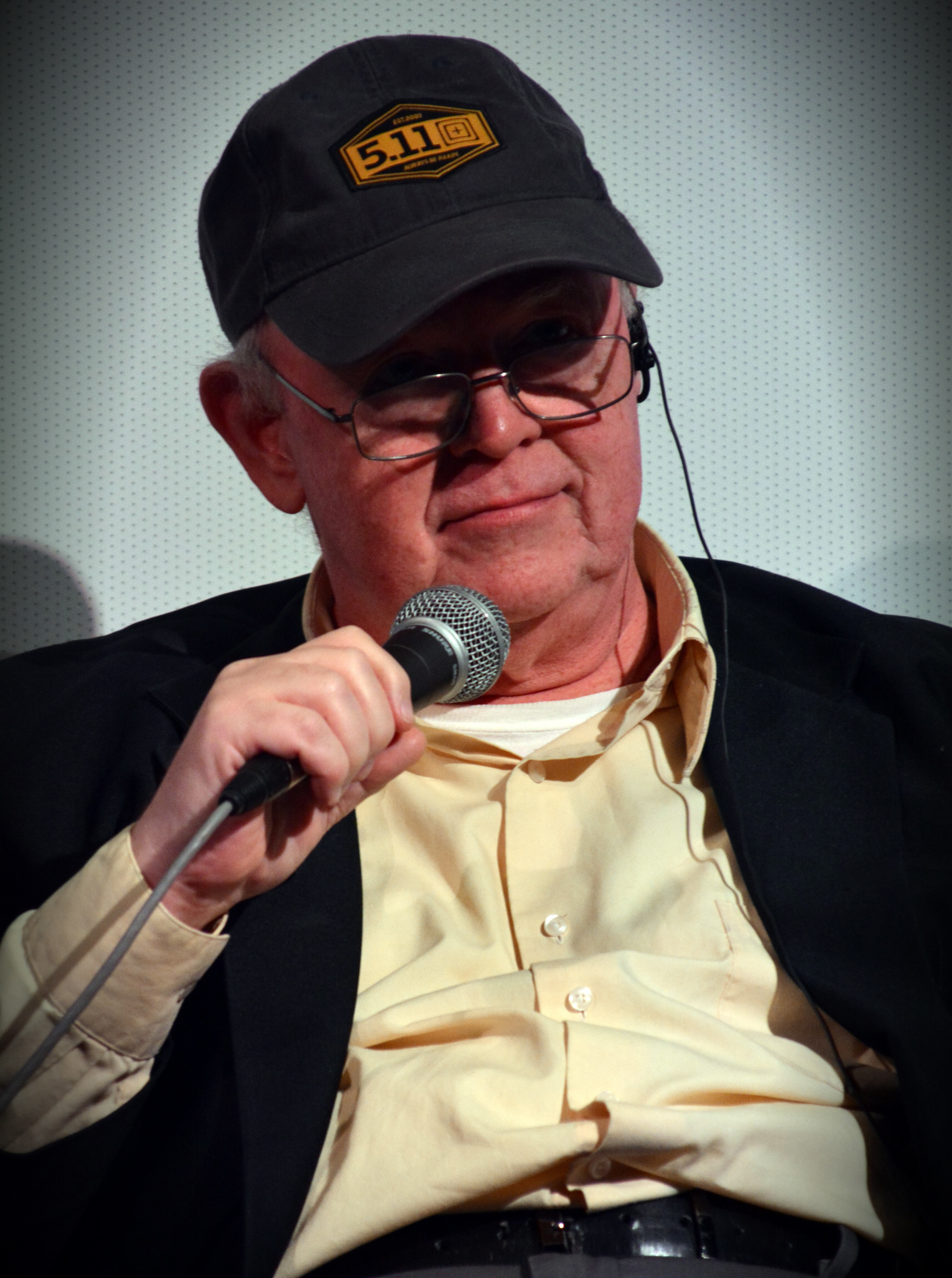 Frank Henenlotter cinémathèque de Toulouse 2016